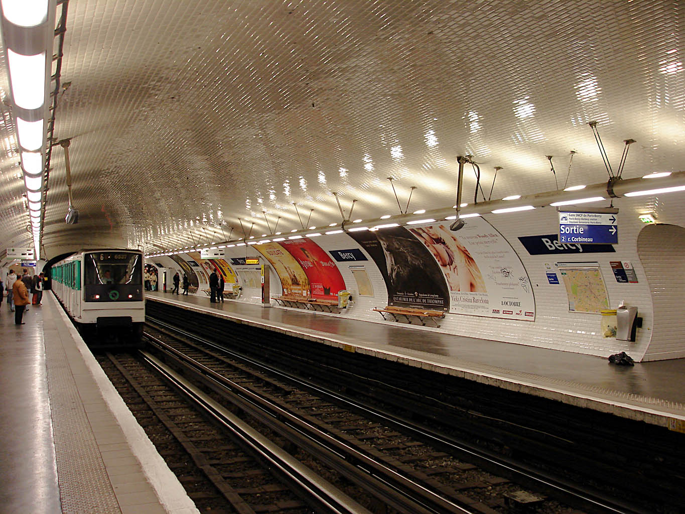 Station Bercy de la ligne 6 du métro de Paris, France.